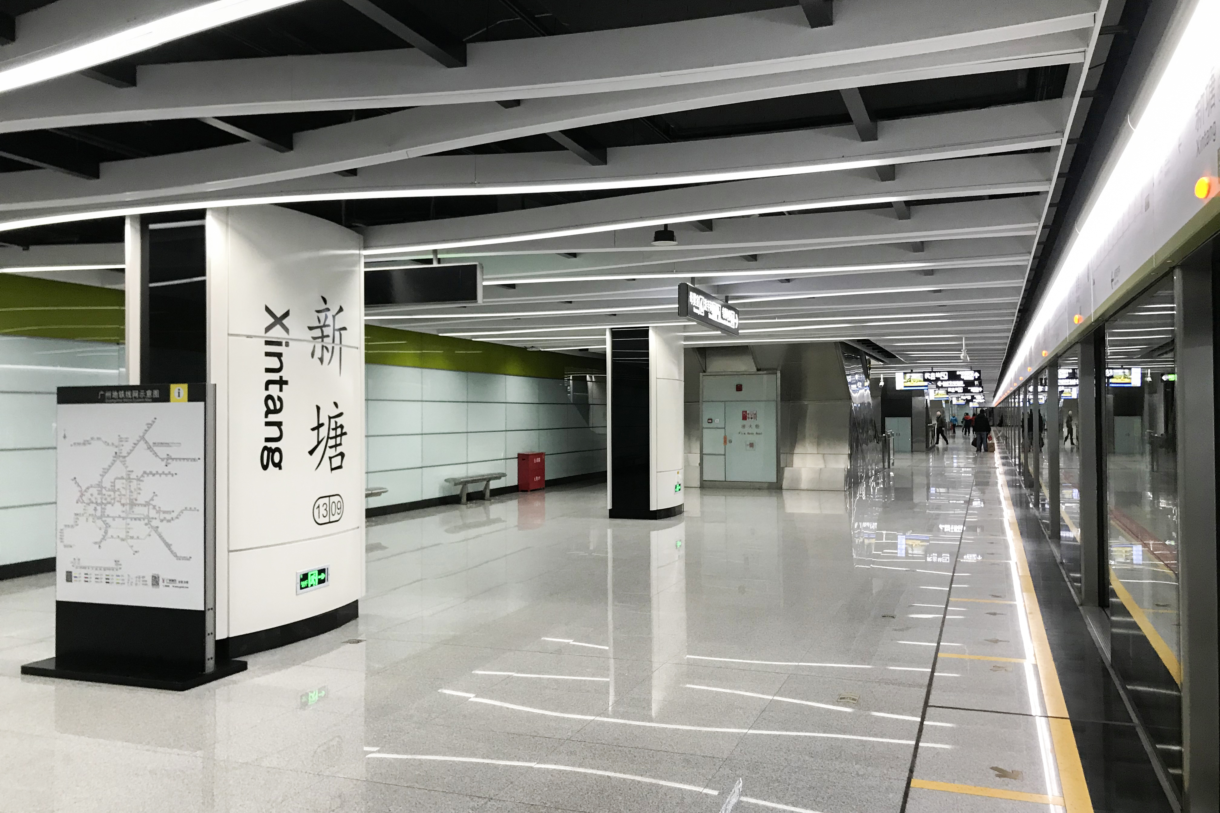 广州地铁新塘站